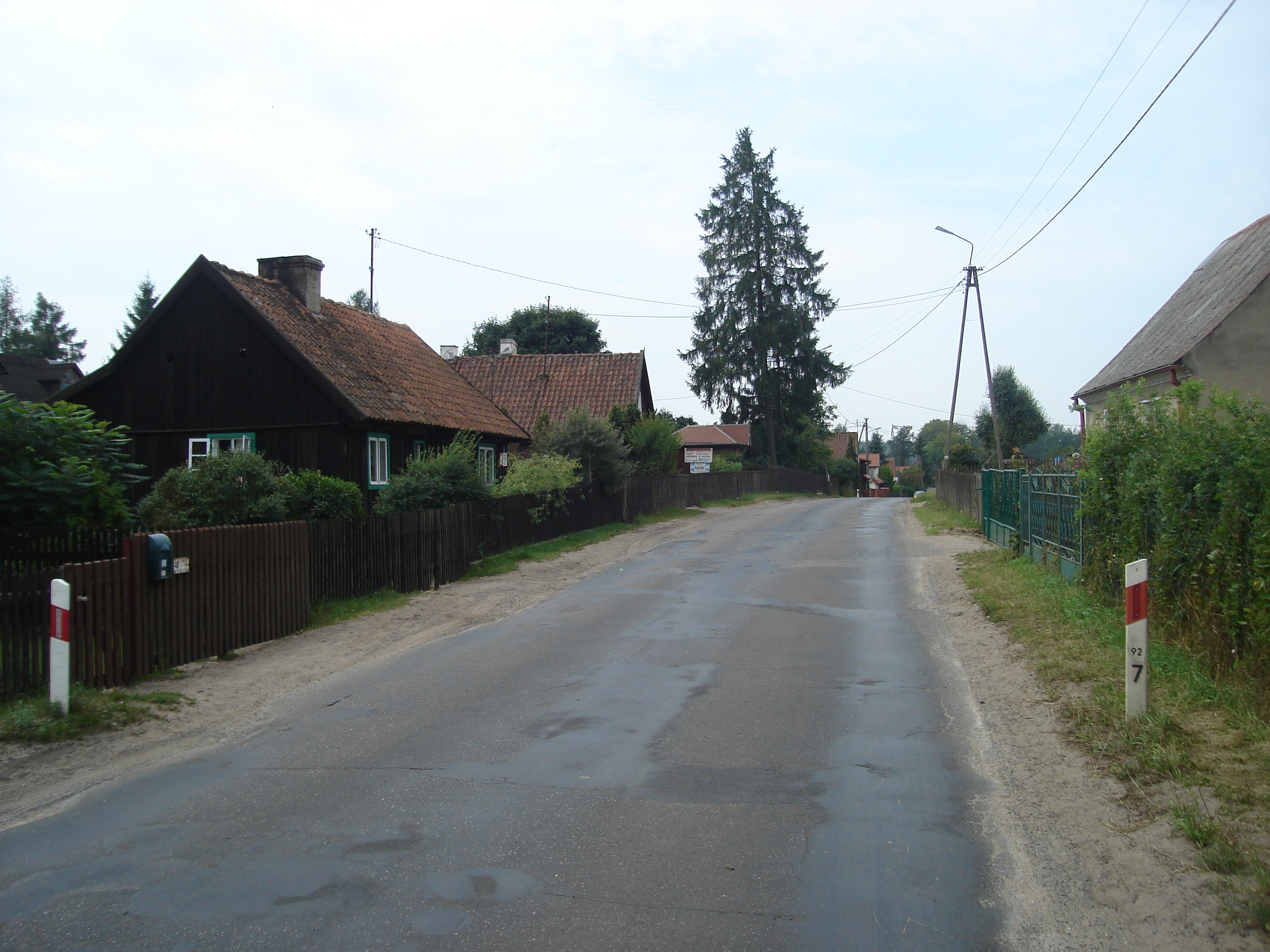 Wieś Zgon